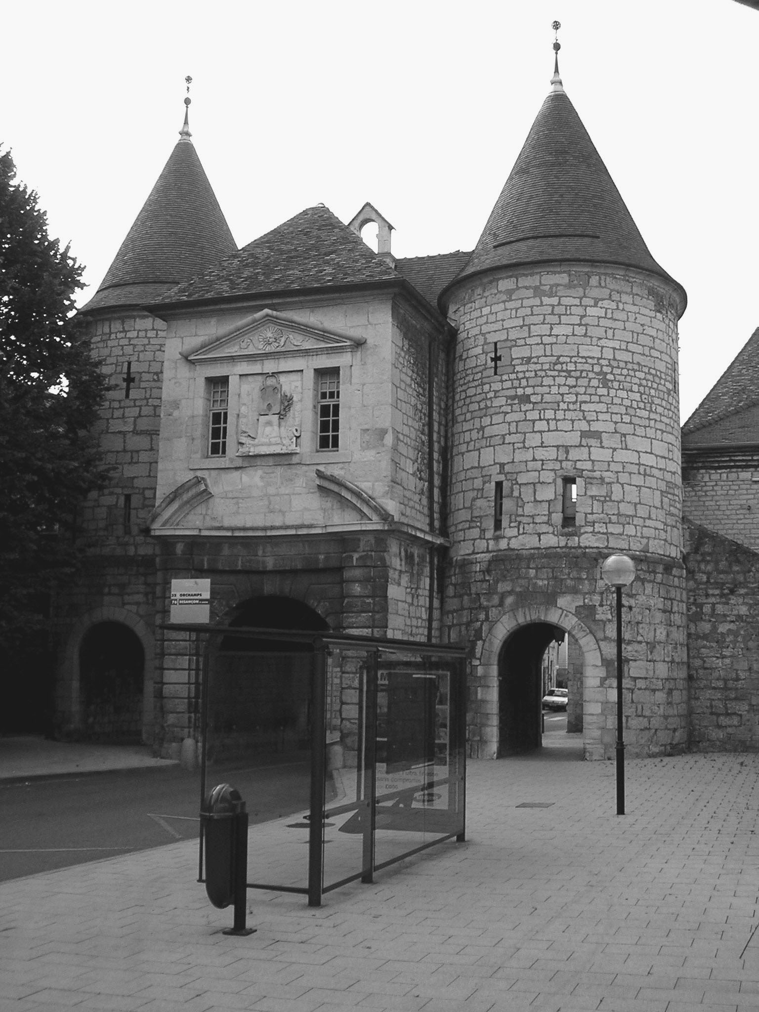 Porte Rivotte de Besançon